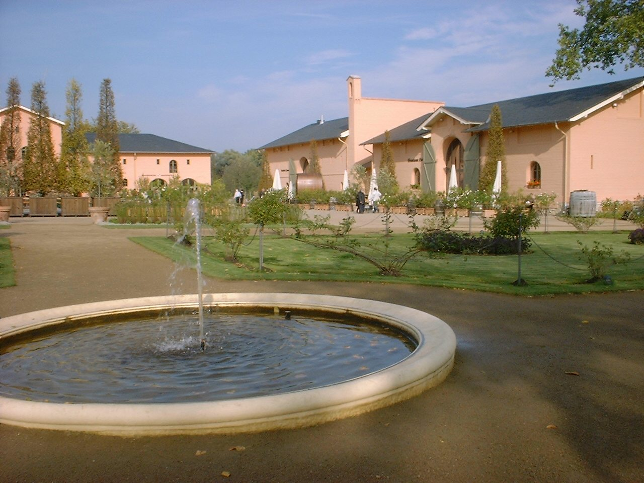 Krongut Bornstedt in Potsdam, Deutschland